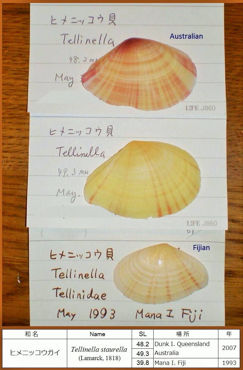 オーストラリアのダンク島とフィジーのマナ島でひろったヒメニッコウガイ。